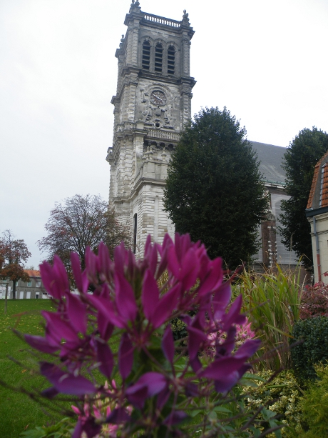 Eglise Saint-Martin de Carvin (62220 - Pas-de-Calais - France)